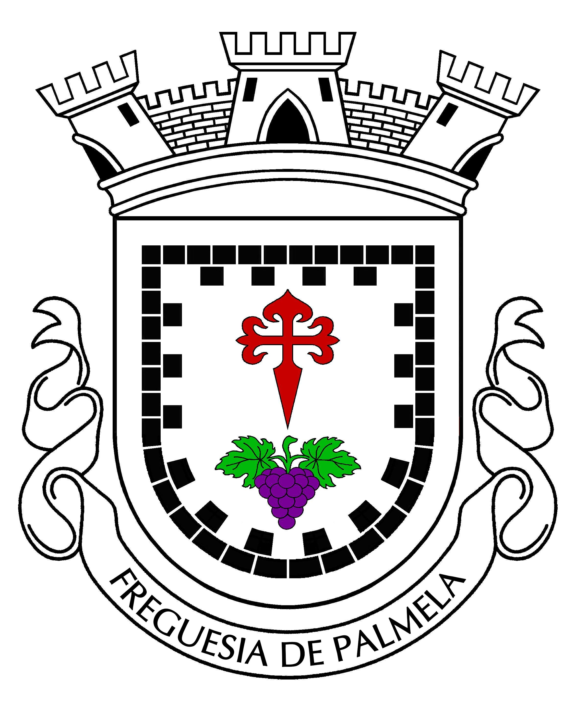 brasão